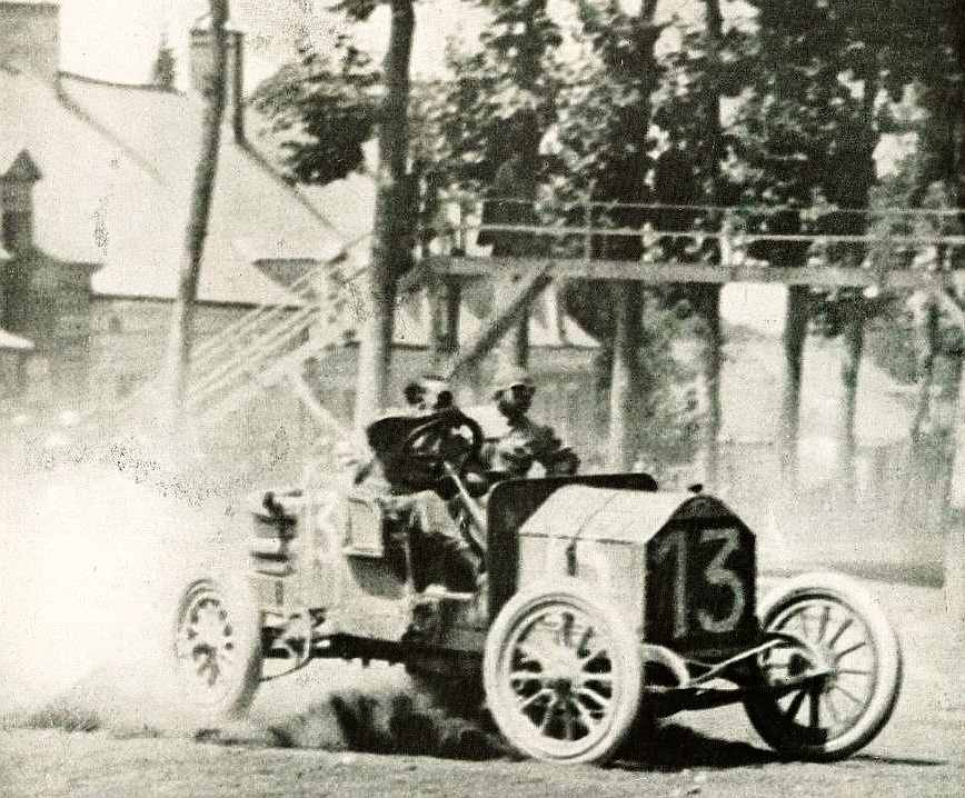 Victor Hémery vainqueur du Grand Prix de l'ACO (des vieux tacots) en 1911 - La Vie au Grand Air du 29 juillet 1911, p.505